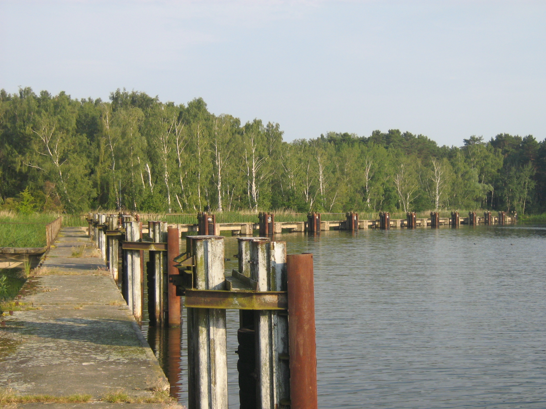 Basen U-bootów w Karsiborze